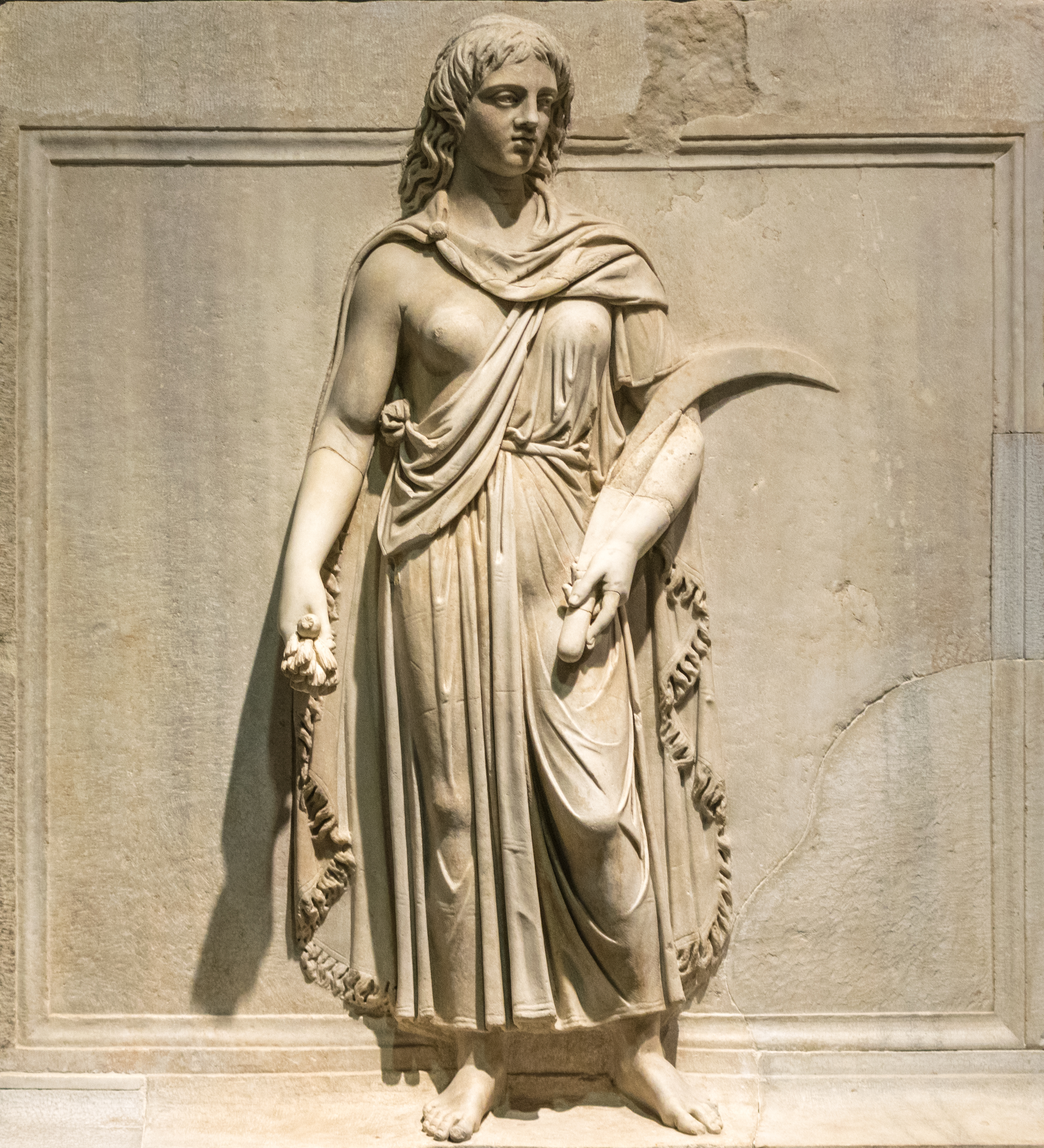 Das Relief, entstanden um das Jahr 145, ist die Personifikation der römischen Provinz Thrakien. Die Zuordnung konnte durch Vergleiche mit Münzen erfolgen